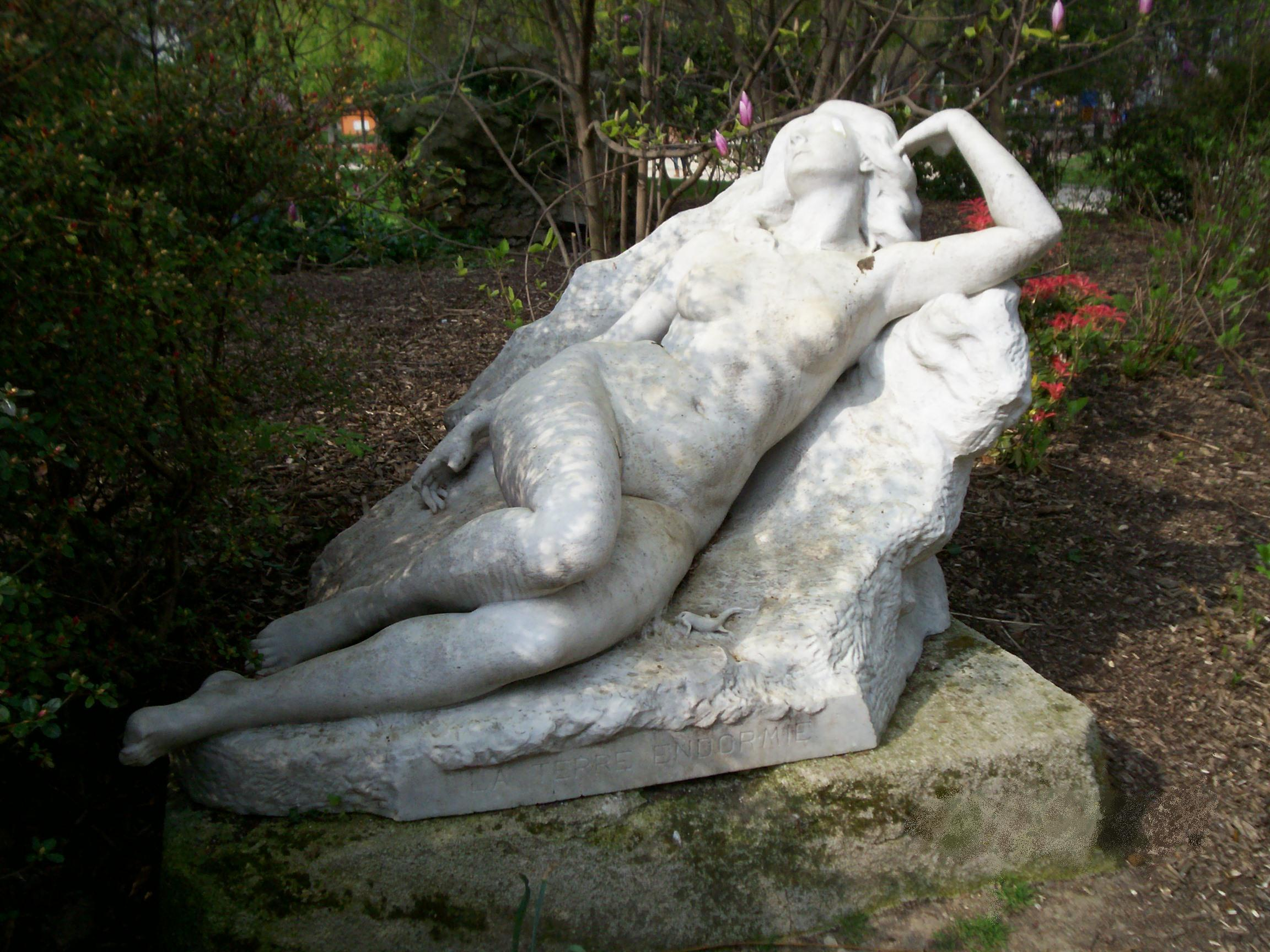 Parc de Clichy (parc Denain, puis Parc Salengro depuis 1937). Statue de la Terre endormie par Noémie Debienne.